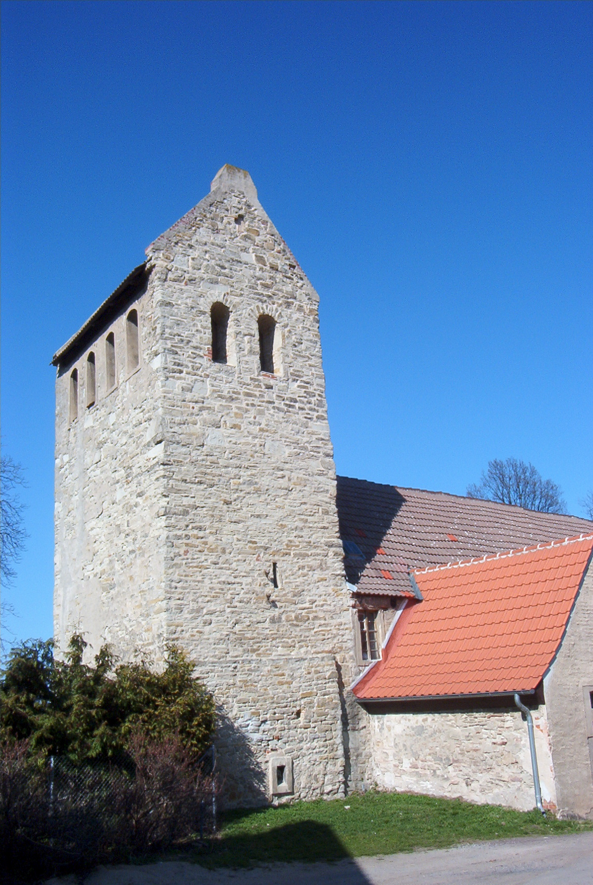 Sankt-Egidius-Kirche in Magdeburg-Sohlen, am 1.4.2005 selbst aufgenommen, erteilte Lizenz: GNU-FDL